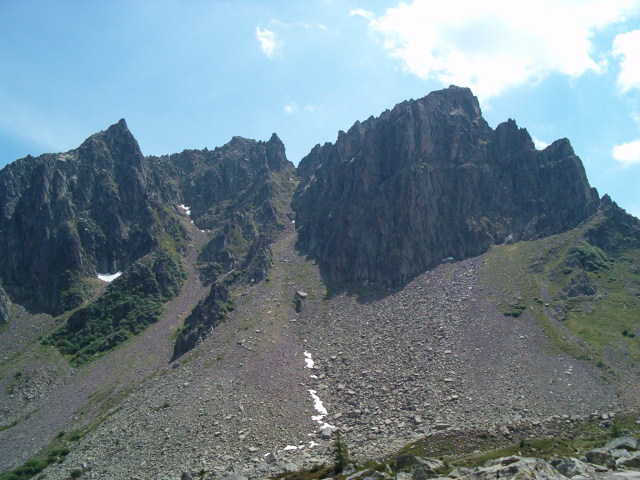 Monte Cauriol, Trentino, Italy